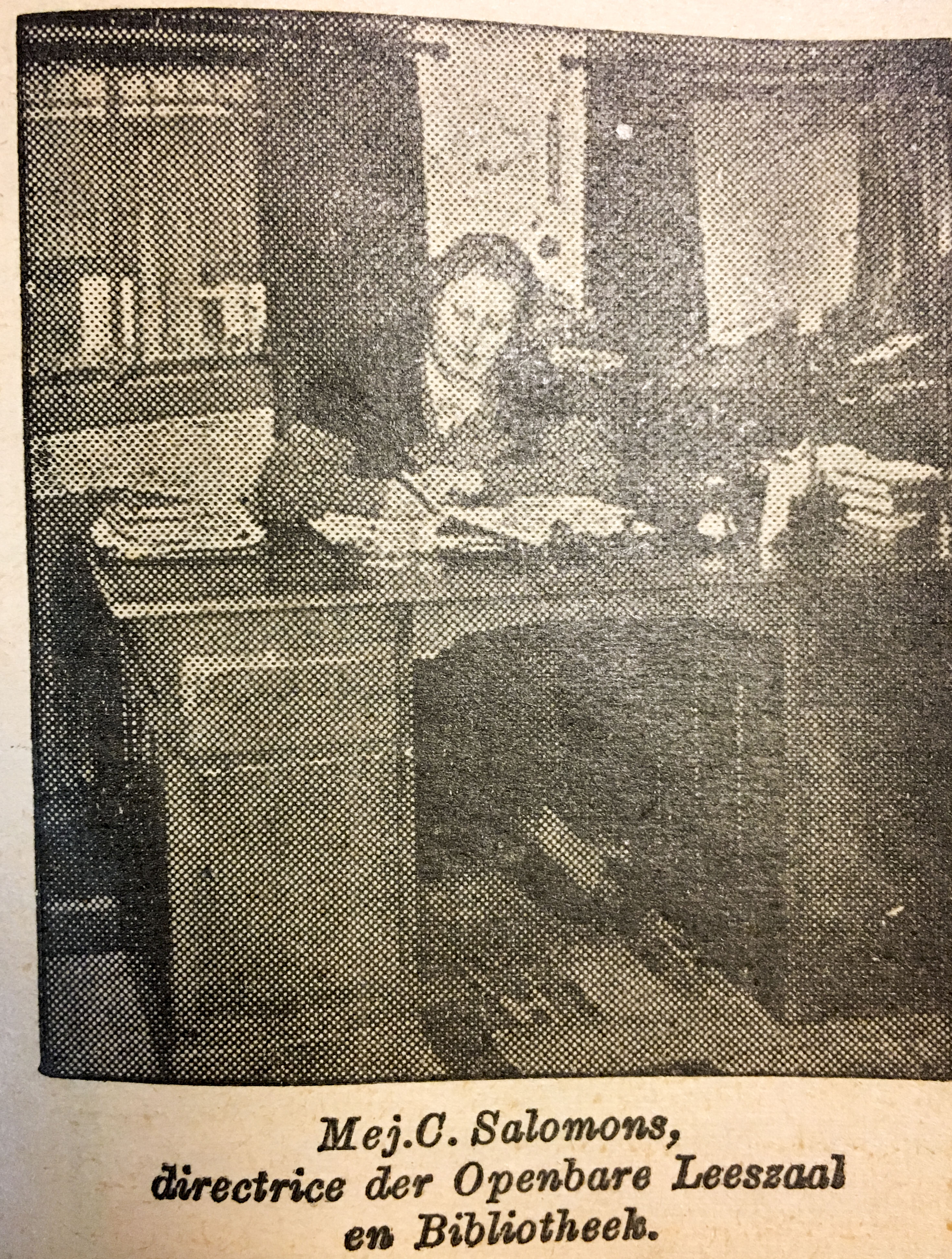 Foto uit de Twentsche Courant gemaakt kort na de opening van de eerst bibliotheek in Hengelo aan de Vondelstraat